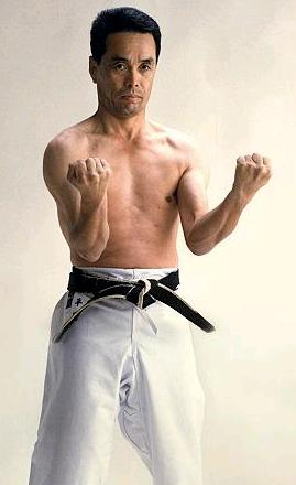 Auteur : Osamu Hirano (Nihon Goju-Ryu Karate-Do Kuyukai International)